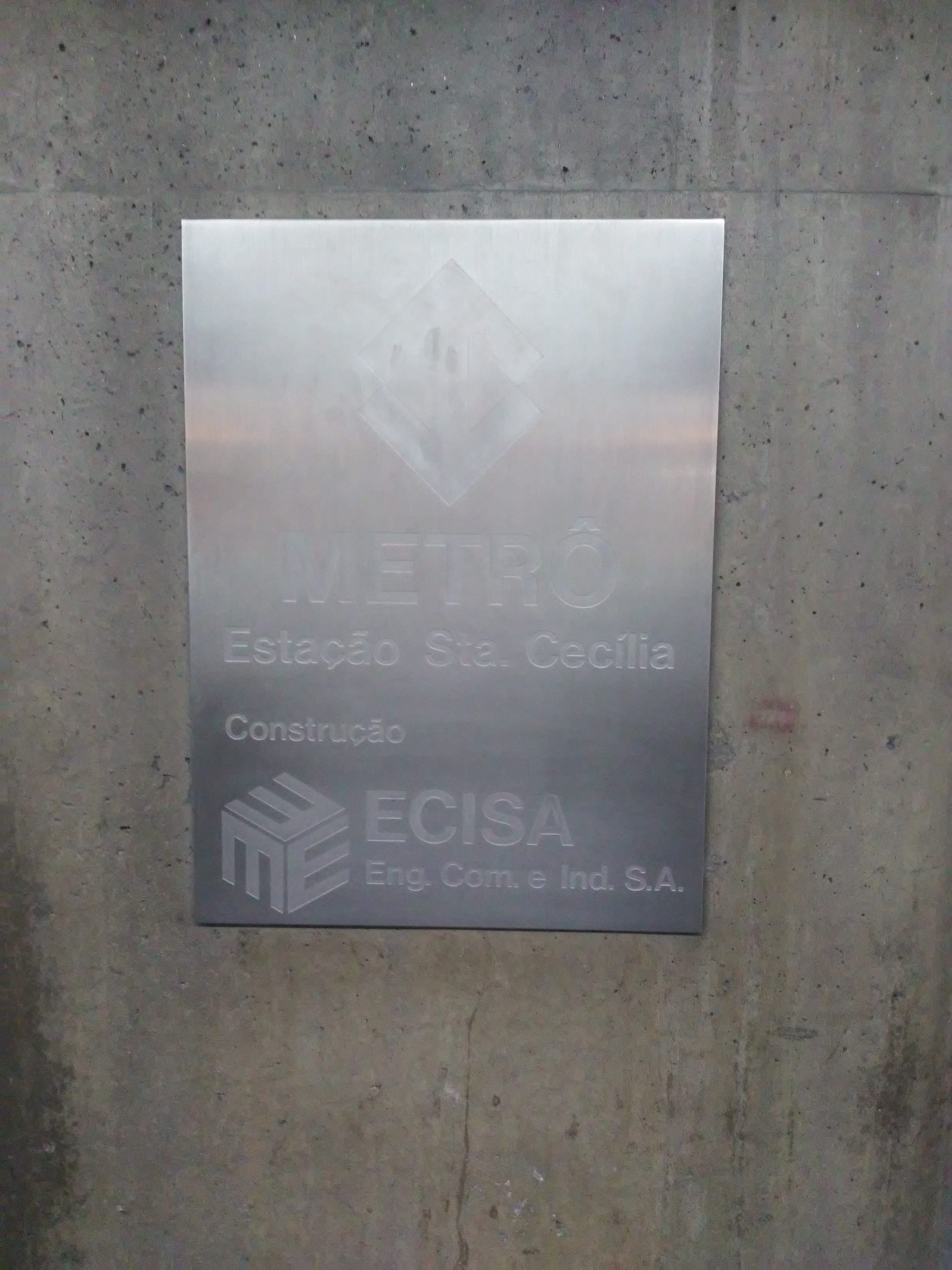 Placa de construção da estação, instalada em dezembro de 1983